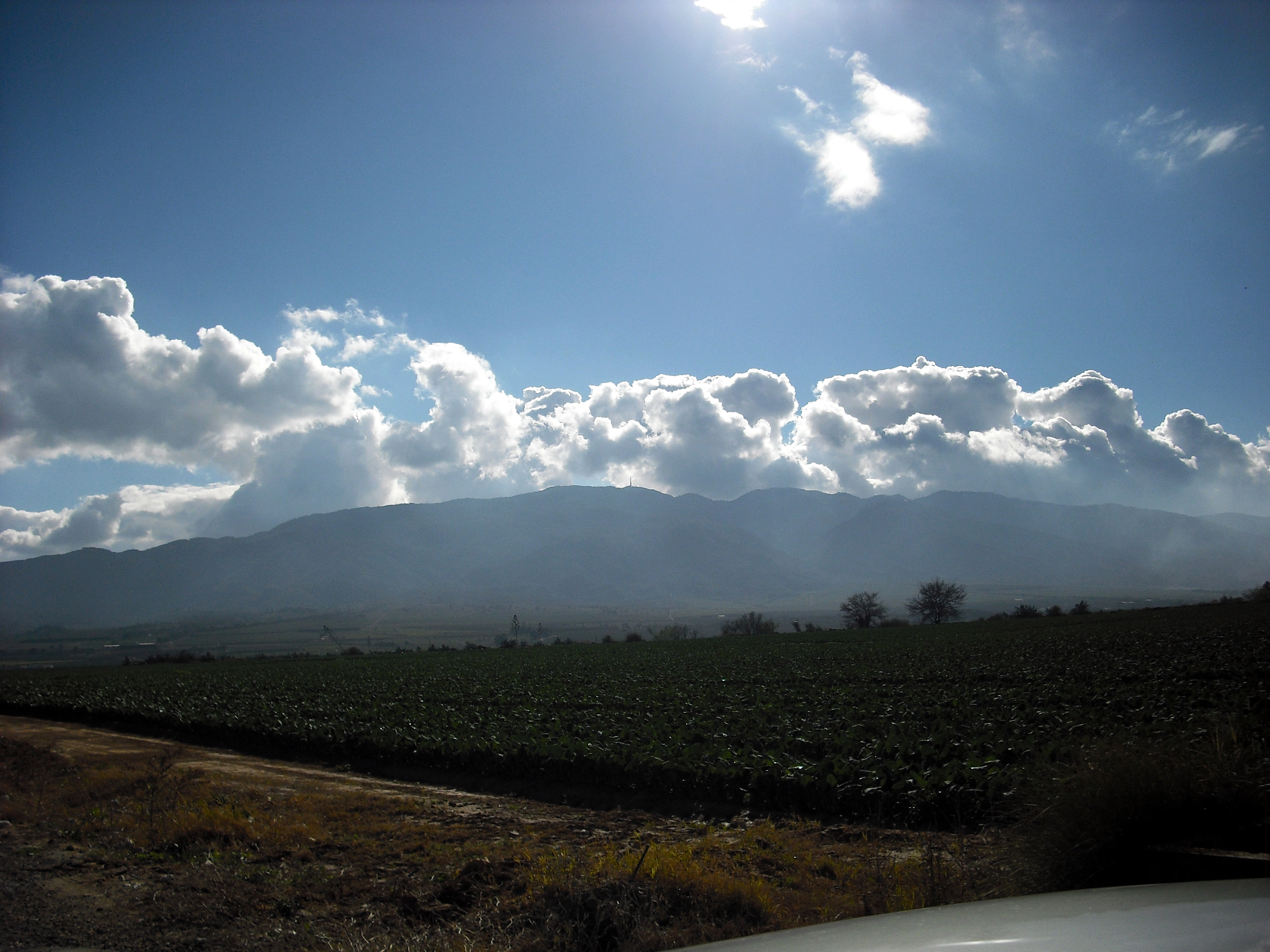 Sierra de Carrascoy, Murcia, España